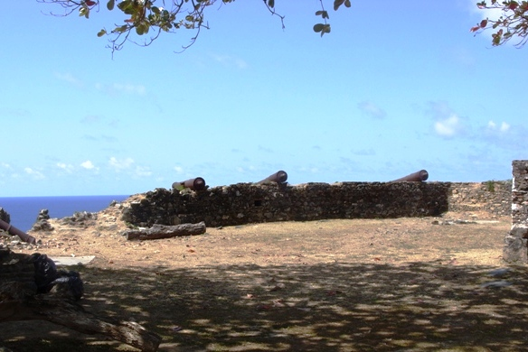 Reduto de Santana, praia do Cachorro, ilha de Fernando de Noronha, Brasil.